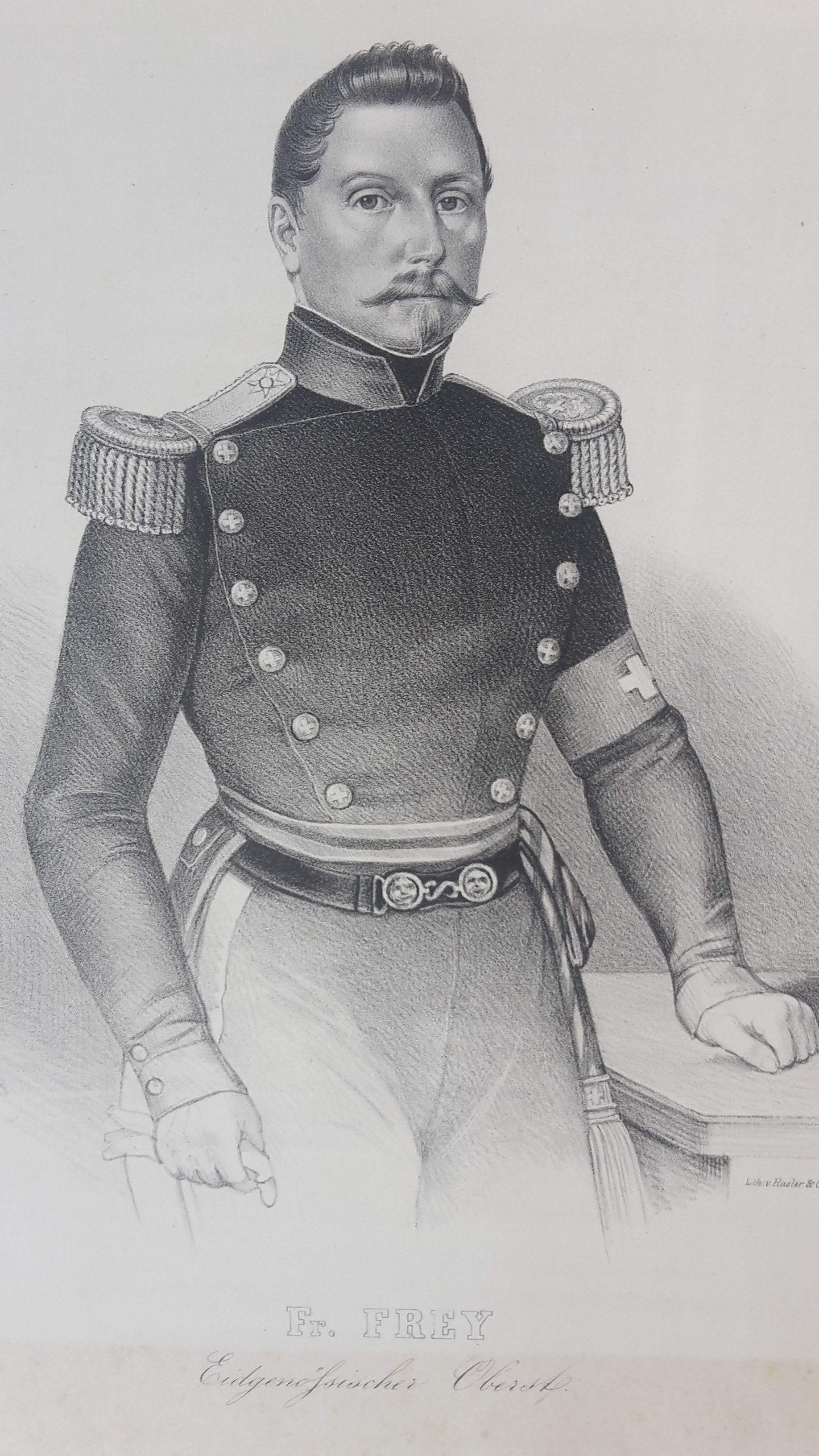 Eidgenösssischer Oberst Friedrich Frey